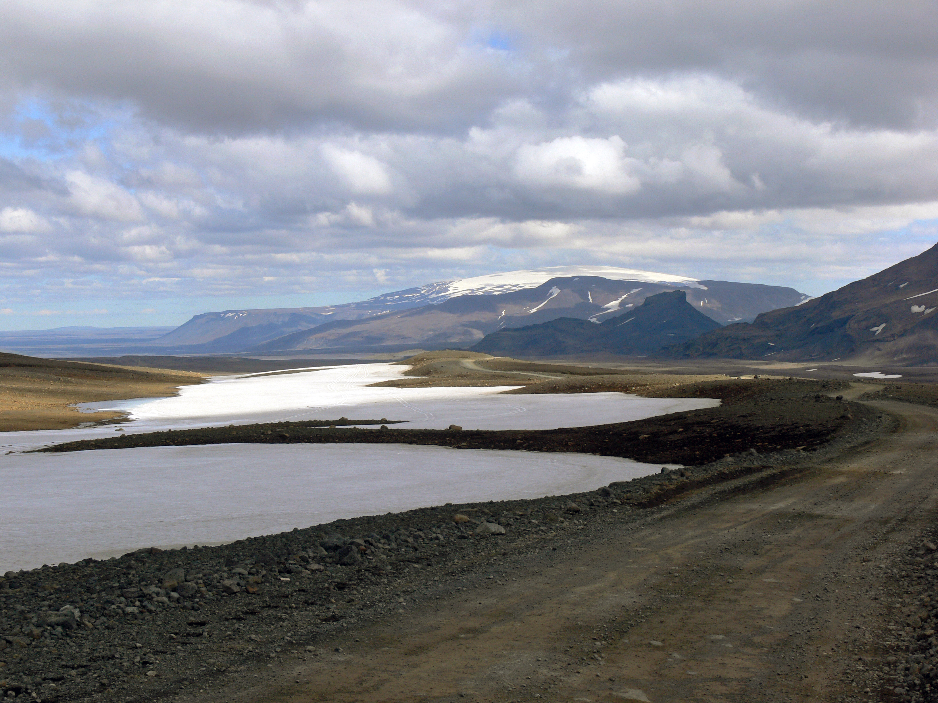 Eiriksjökull in Island.